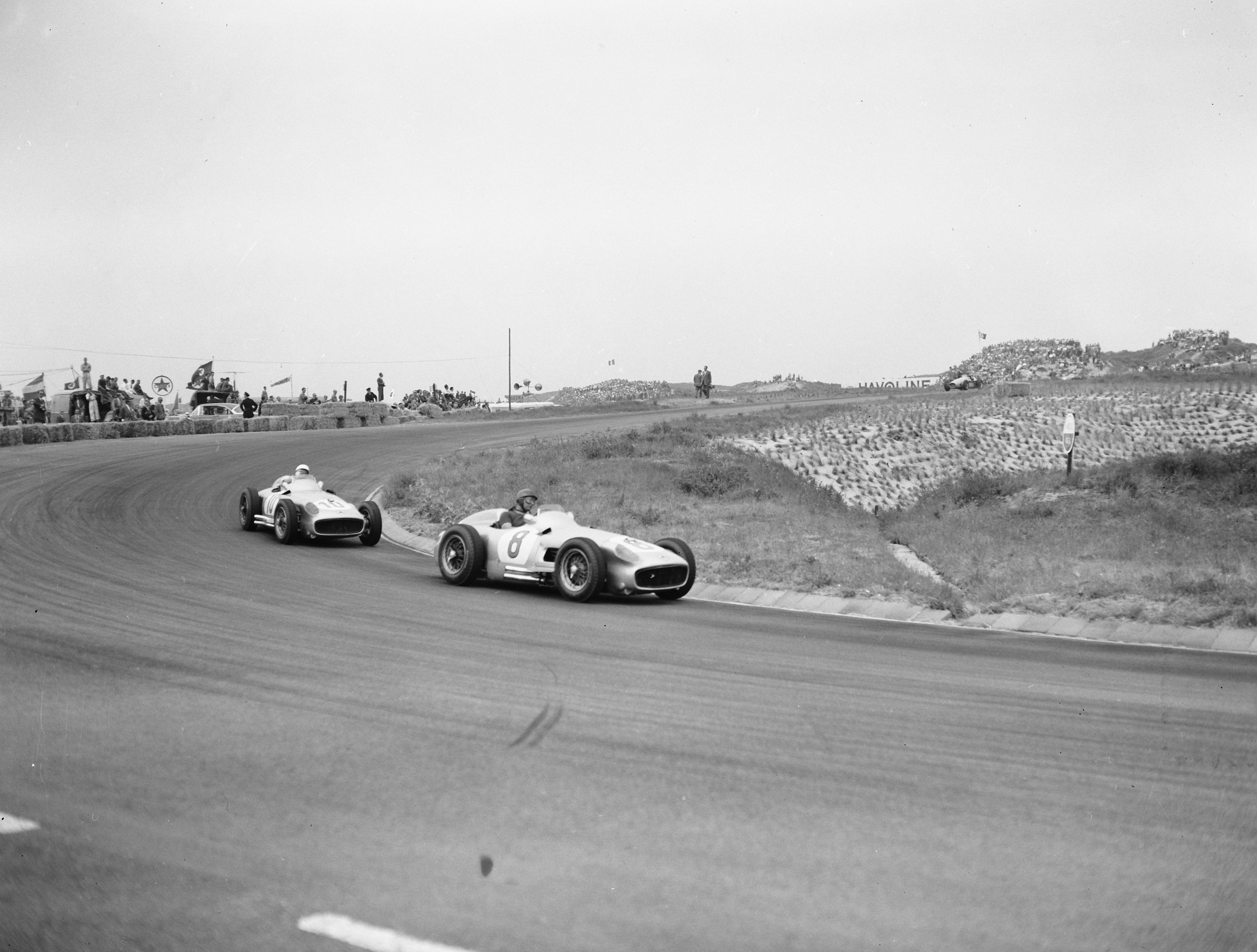 Collectie / Archief : Fotocollectie Anefo Reportage / Serie : [ onbekend ] Beschrijving : Grote Prijs van Nederland Zandvoort Datum : 19 juni 1955 Locatie : Noord-Holland, Zandvoort Persoonsnaam : Grote prijs van Nederland Fotograaf : Pot, Harry / Anefo Auteursrechthebbende : Nationaal Archief Materiaalsoort : Negatief (zwart/wit) Nummer archiefinventaris : bekijk toegang 2.24.01.04 Bestanddeelnummer : 907-1906